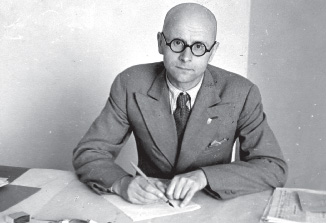 Мікалай Восіпавіч Шкялёнак